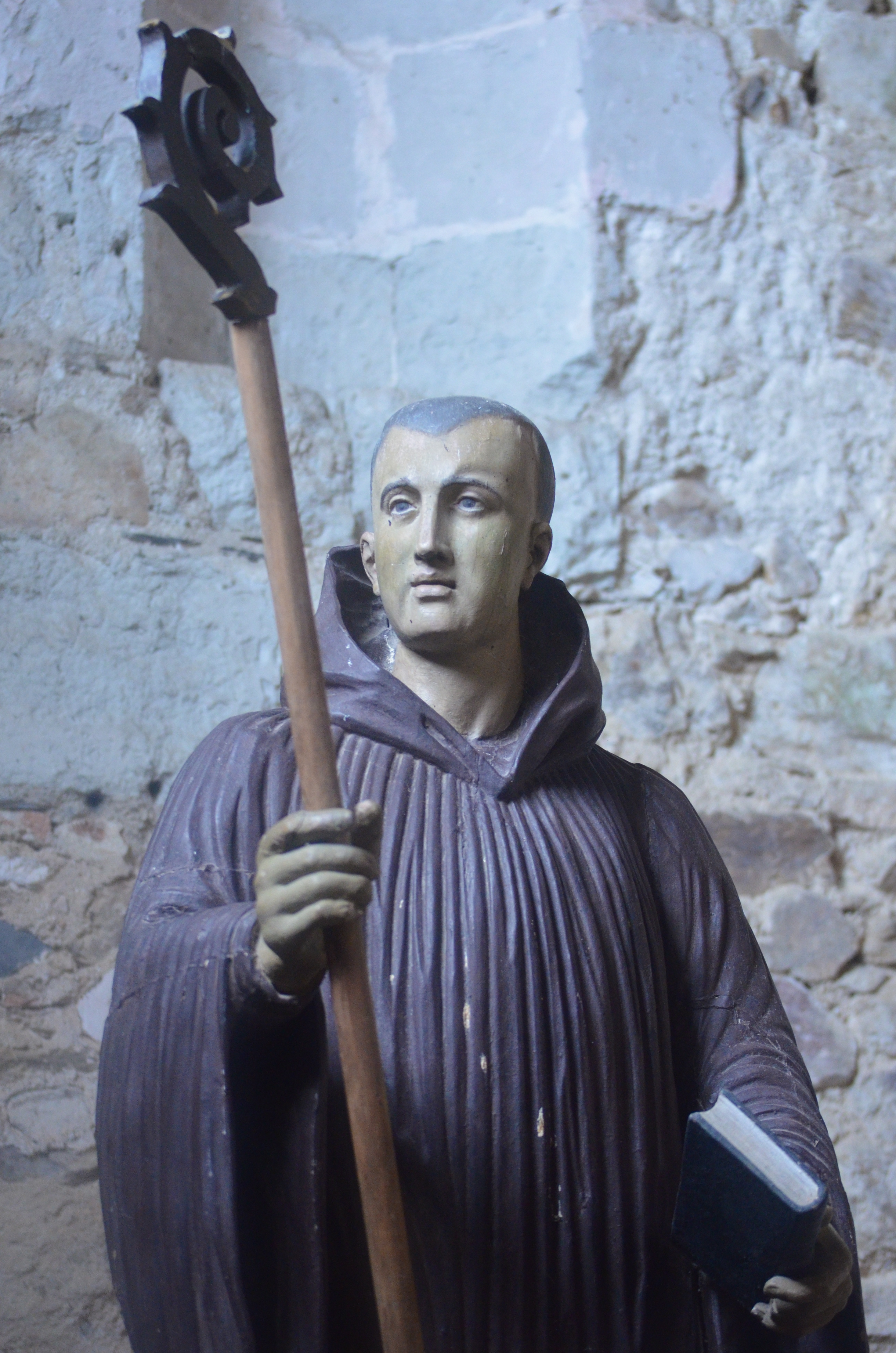 Abbatiale de Saint-Philbert-de-Grand-Lieu (Loire-Atlantique)